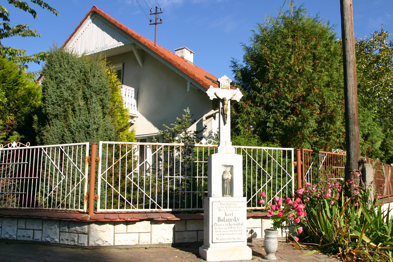 Trawniki – wieś w Polsce położona w województwie opolskim, w powiecie kędzierzyńsko-kozielskim, w gminie Pawłowiczki.